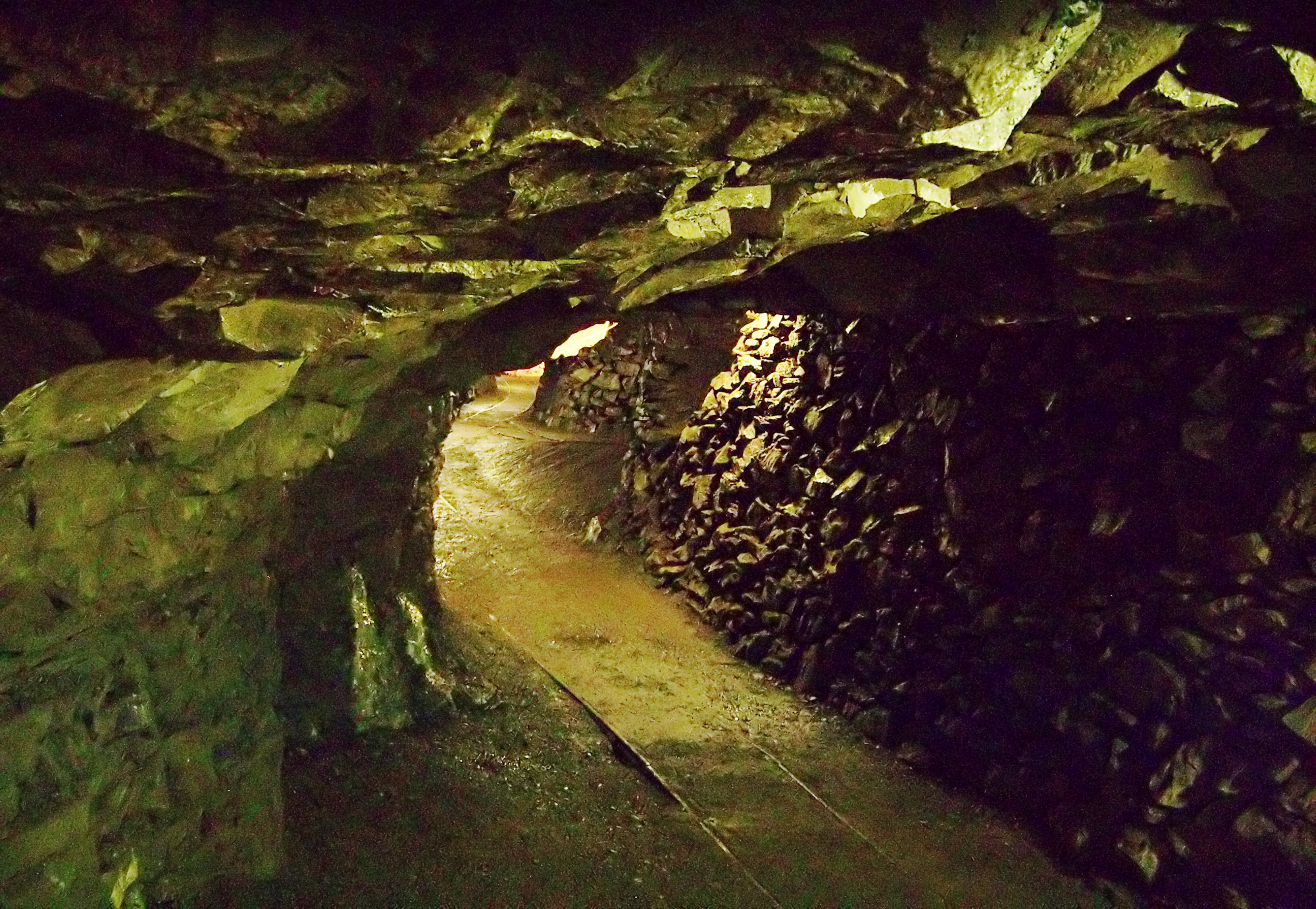 Kalksteinbergwerk Wolfstein